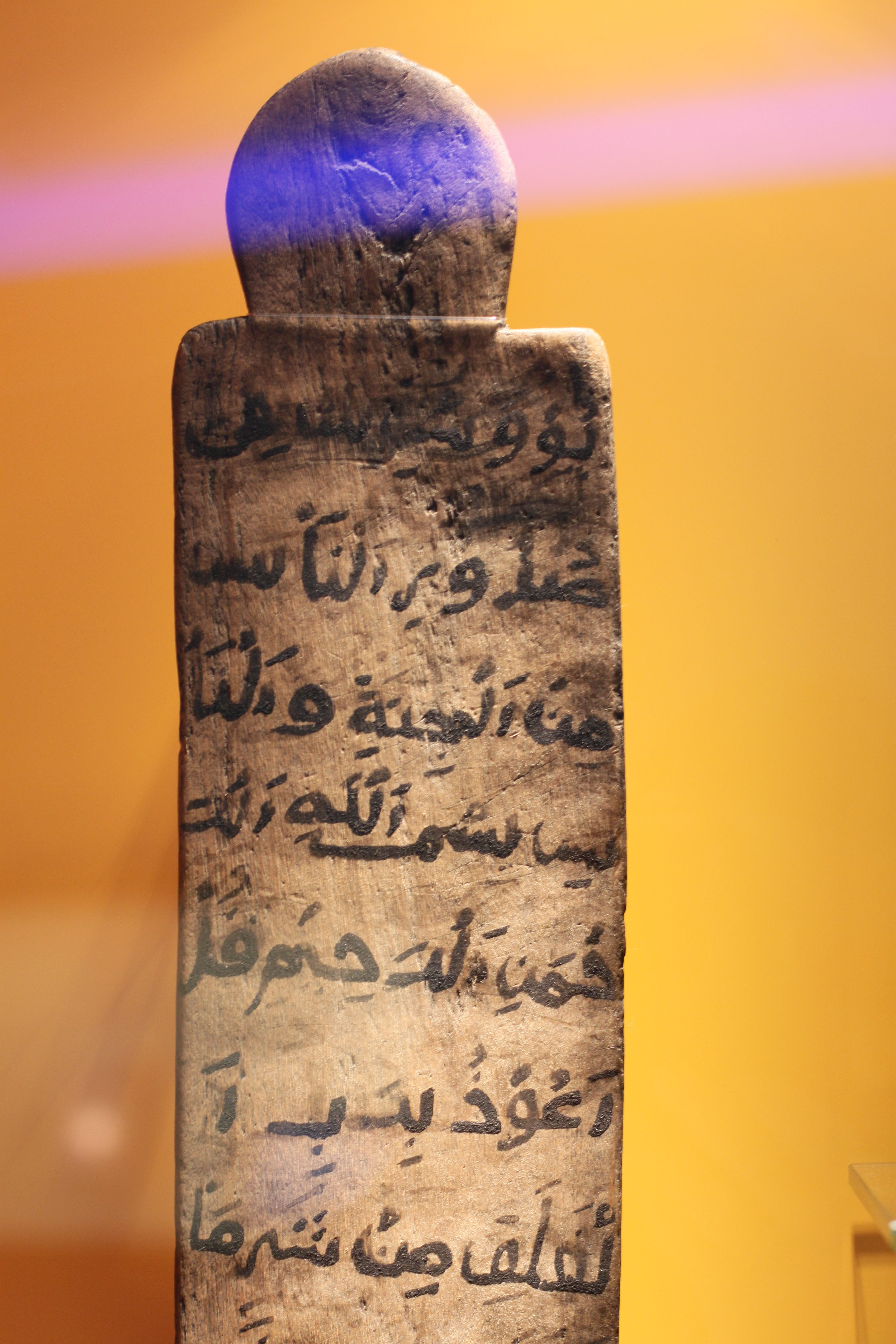 Korantafel; Sammlung Präger 2004; Somalia; im Überseemuseum